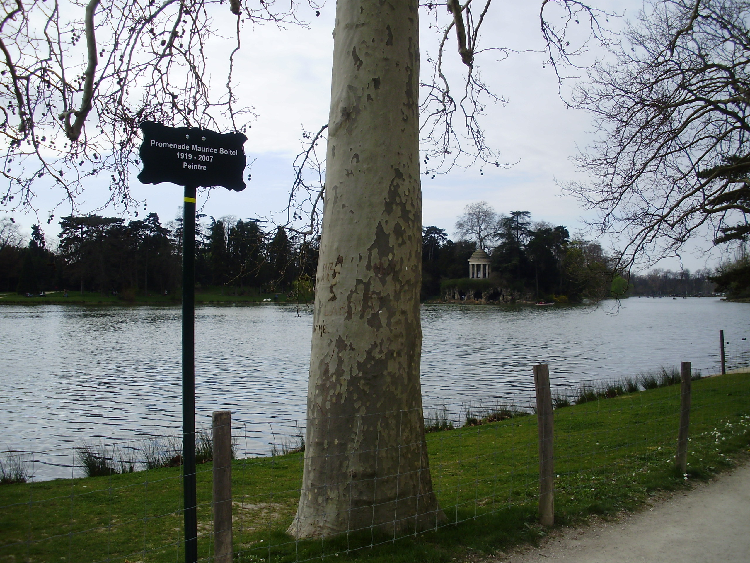 Panneau de la promenade Maurice-Boitel, sur le chemin pour piétons autour du lac Daumesnil, à Paris 12e, France.